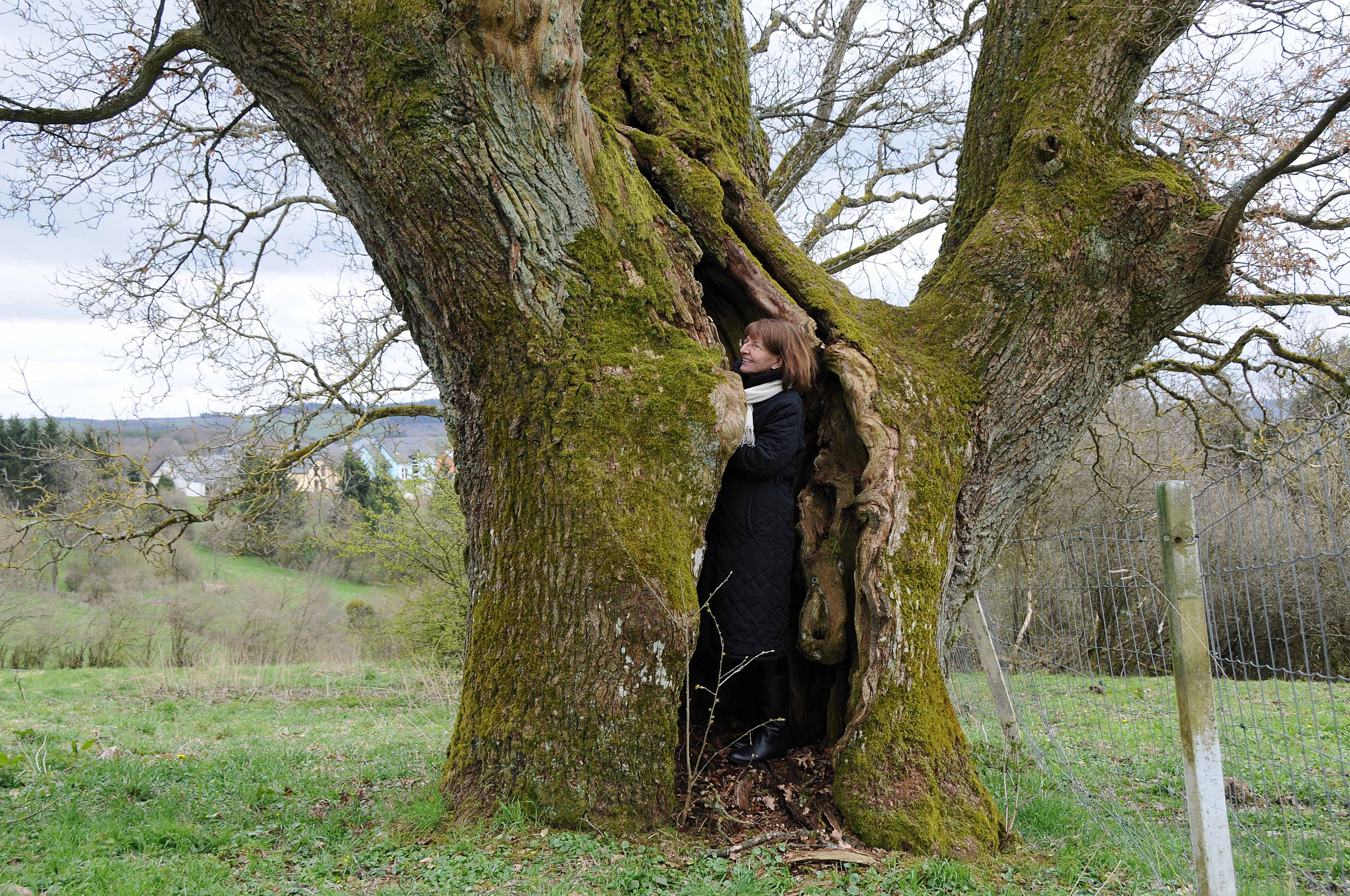 Eech zu Munzen. Munzen + Kategorie:Gemeng Munzen